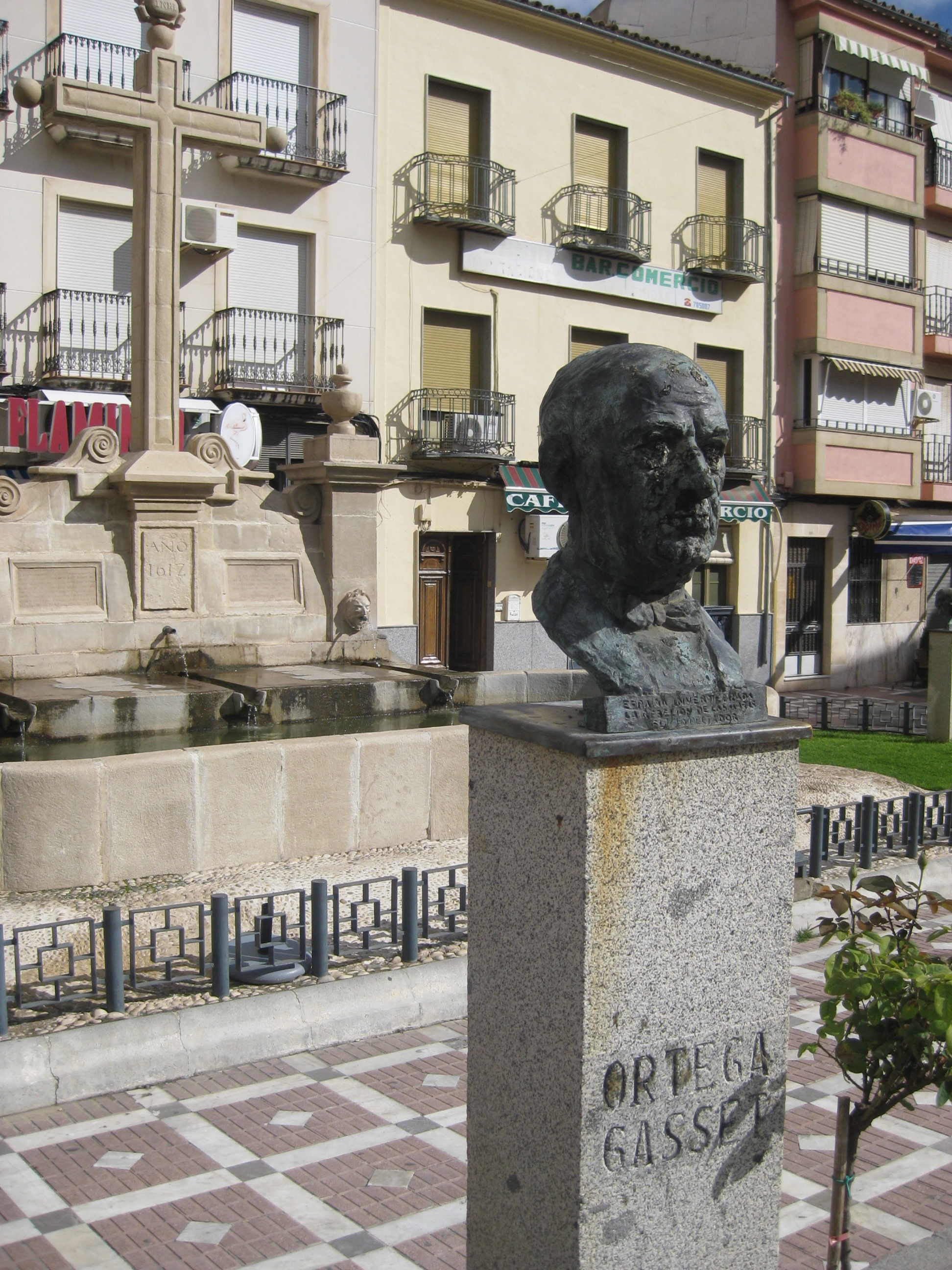 jodar oct 2012